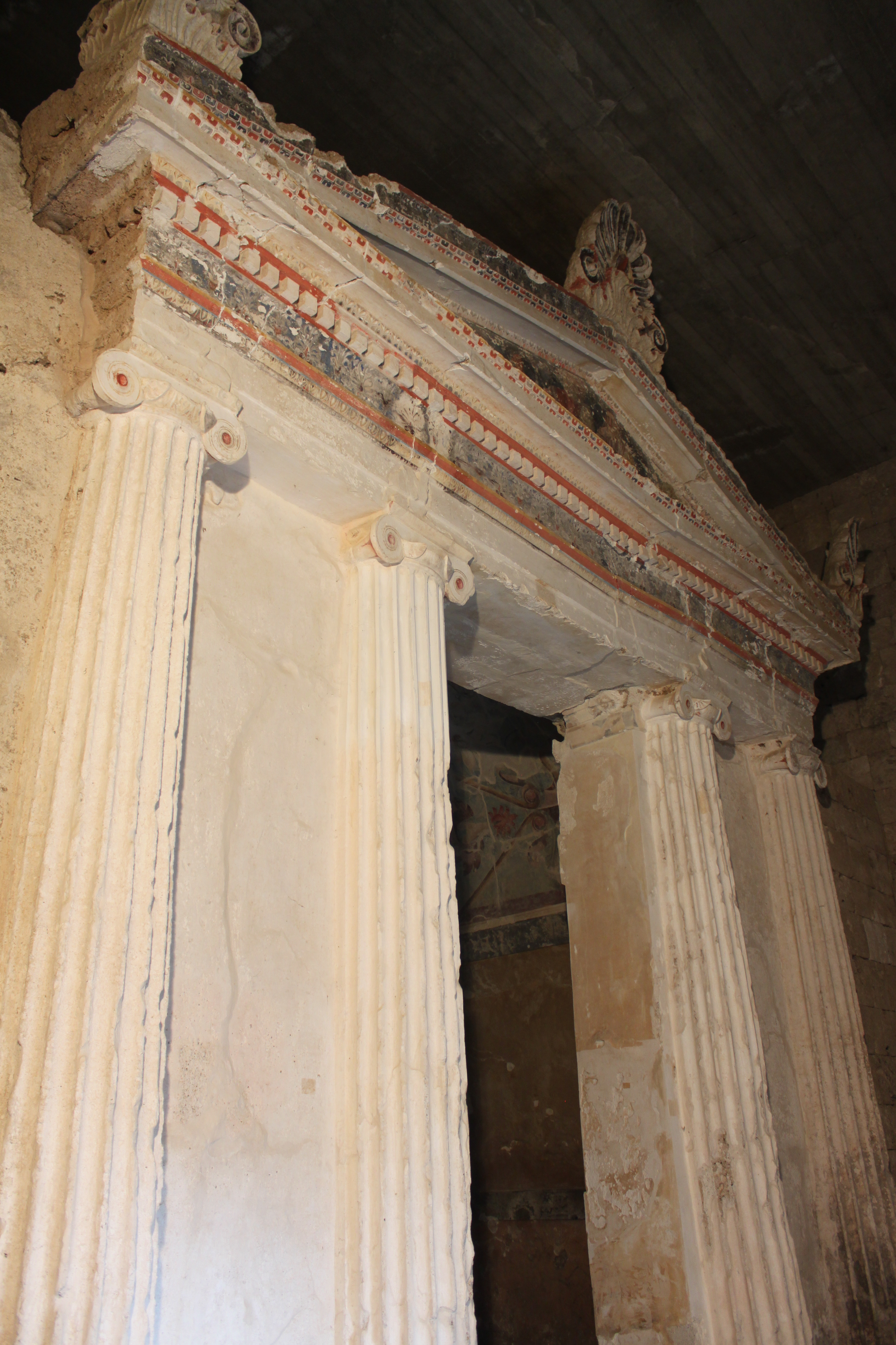 Façade de la tombe des palmettes à Lefkadia (Macédoine, Grèce)